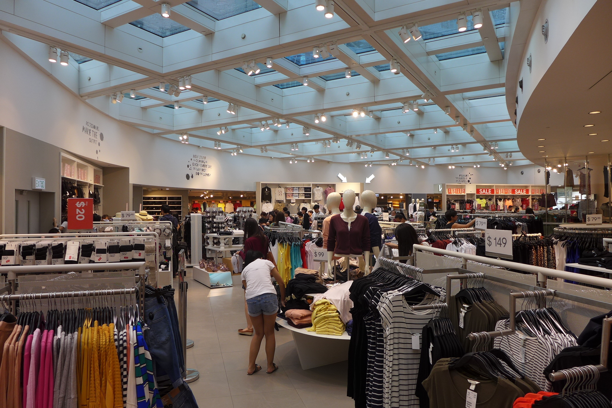 apm Level 1 X-side H&M